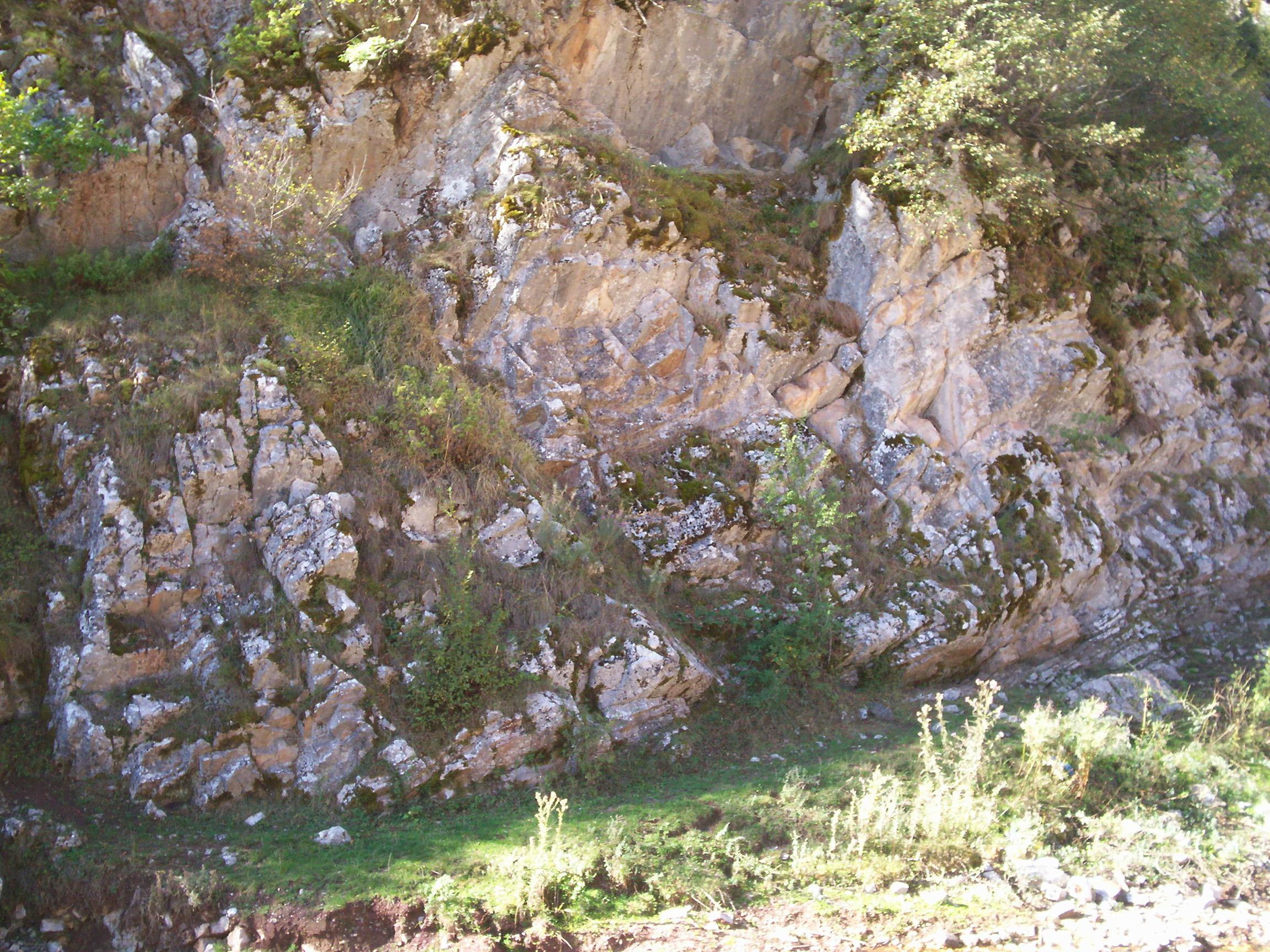 Bogove, Skrapar